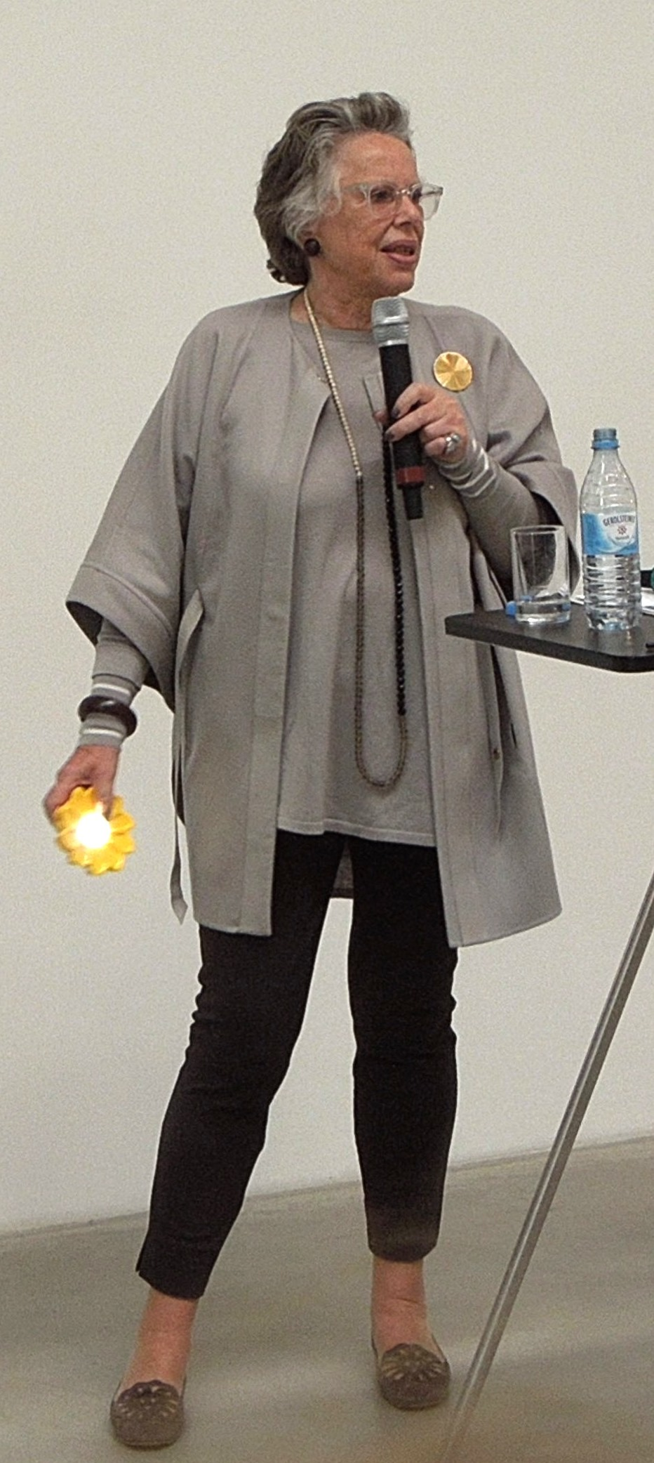 Sabine Langen-Crasemann, Vorstand der Langen Foundation, mit der gelben LED Solarlampe von Olafur Eliasson